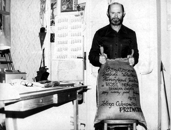 Kapitan Henryk Jaskuła z prezentem od cukrowni Przeworsk Zdjęcie pochodzi z prywatnego archiwum Henryka Jaskuły Zdjęcie zostało udostępnione przez magazyn wodniaków Port21.pl